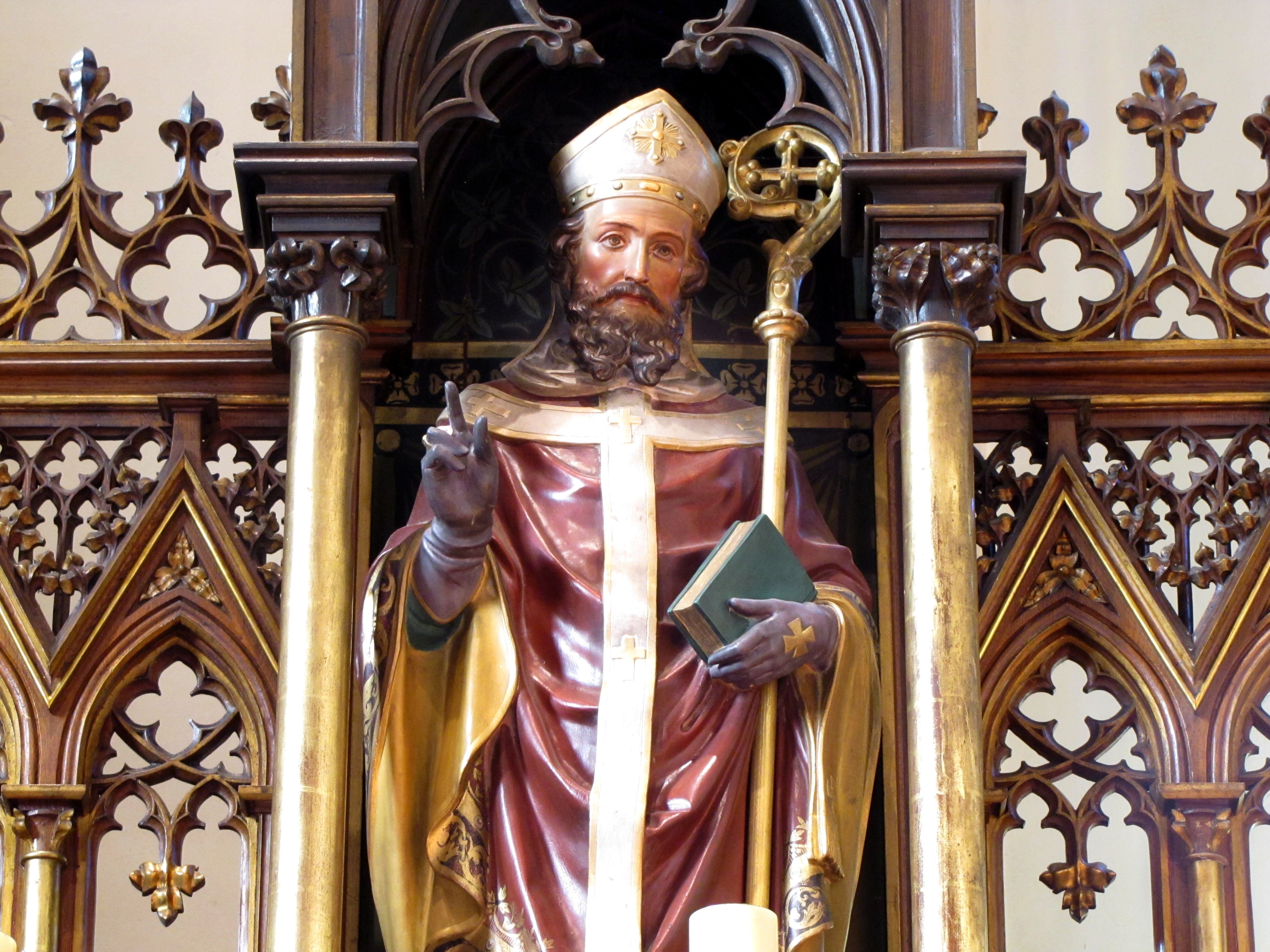 Alsace, Bas-Rhin, Soultz-les-Bains, Église Saint-Maurice (PA67000007, IA67006055). Maître-autel (1897): Statue de Saint-Amand.